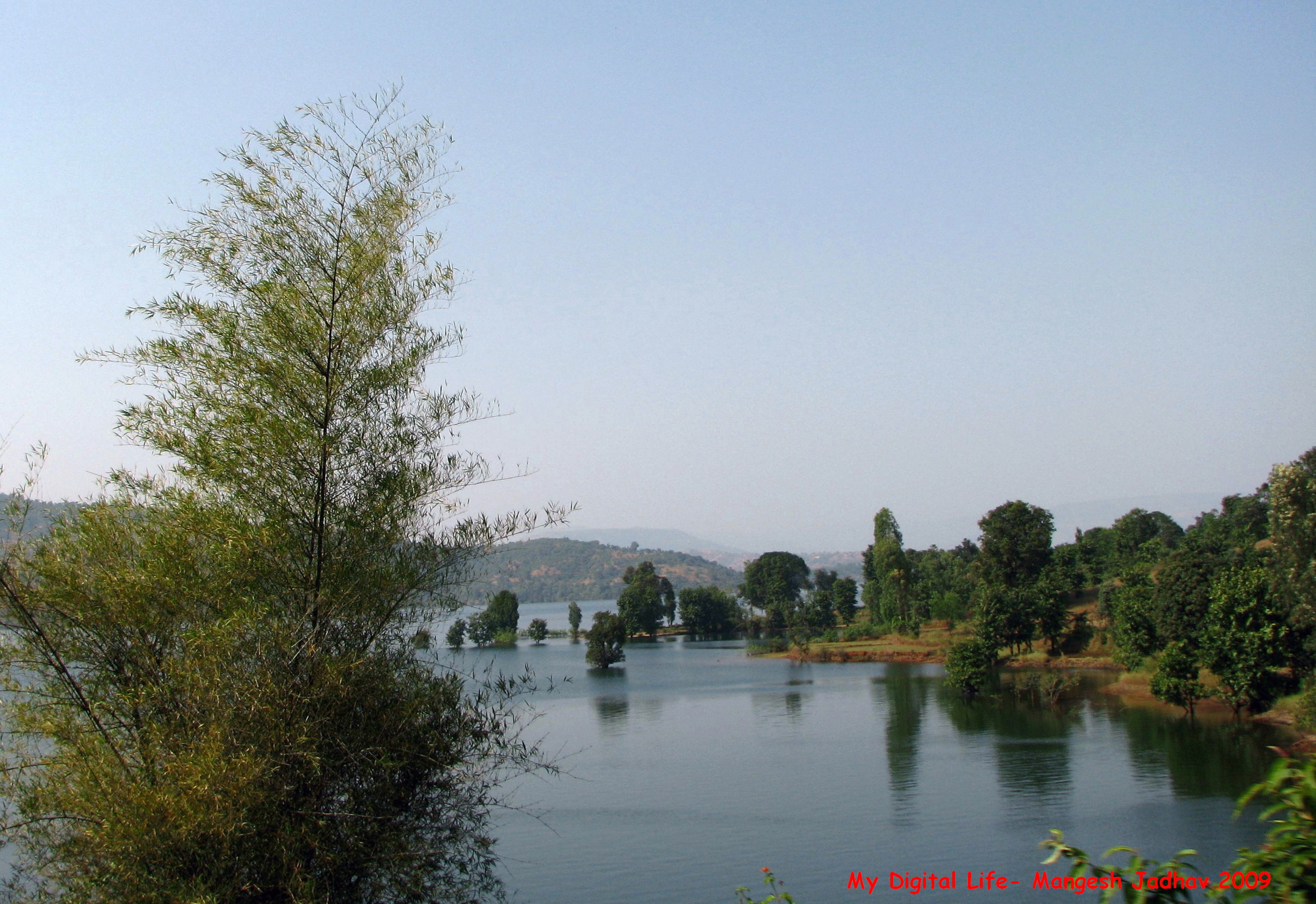 Bamnoli